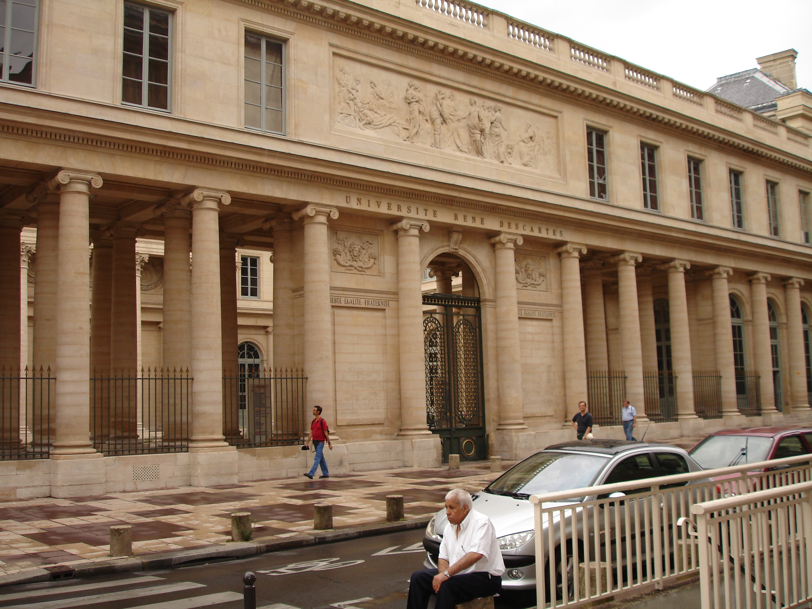 René Descartes University, Paris, France